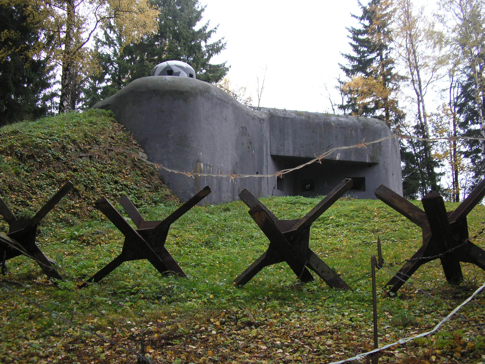 K-S 5 U potoka s rozsochaci